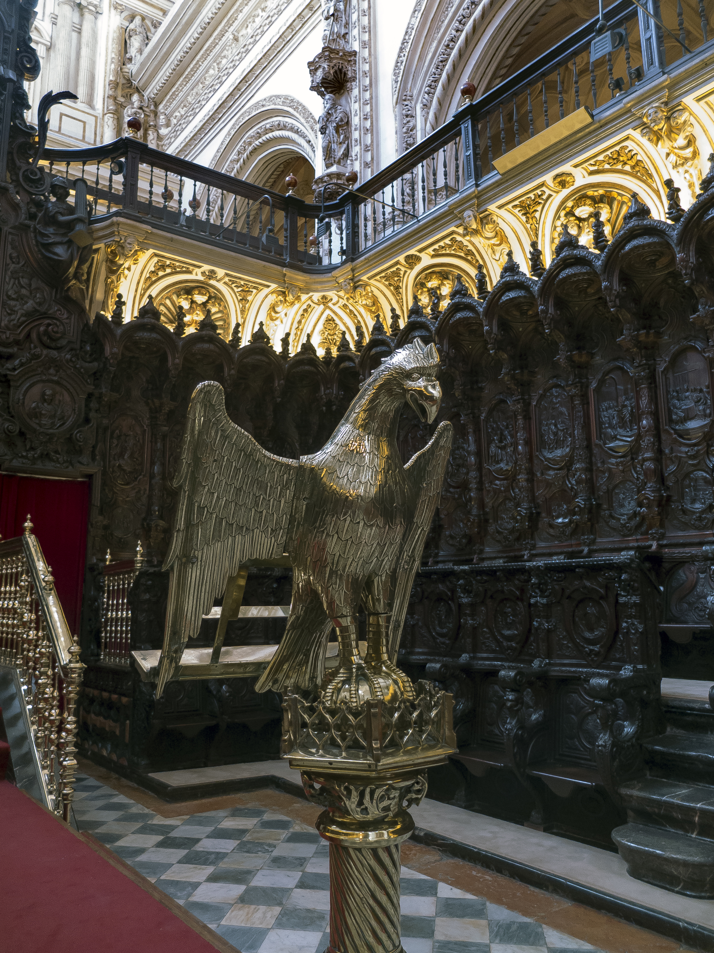 Mezquita-iglesia-catedral de la Asunción de Ntra. Sra.